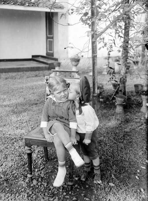 Negatief. Kussende Europese kinderen in de tuin